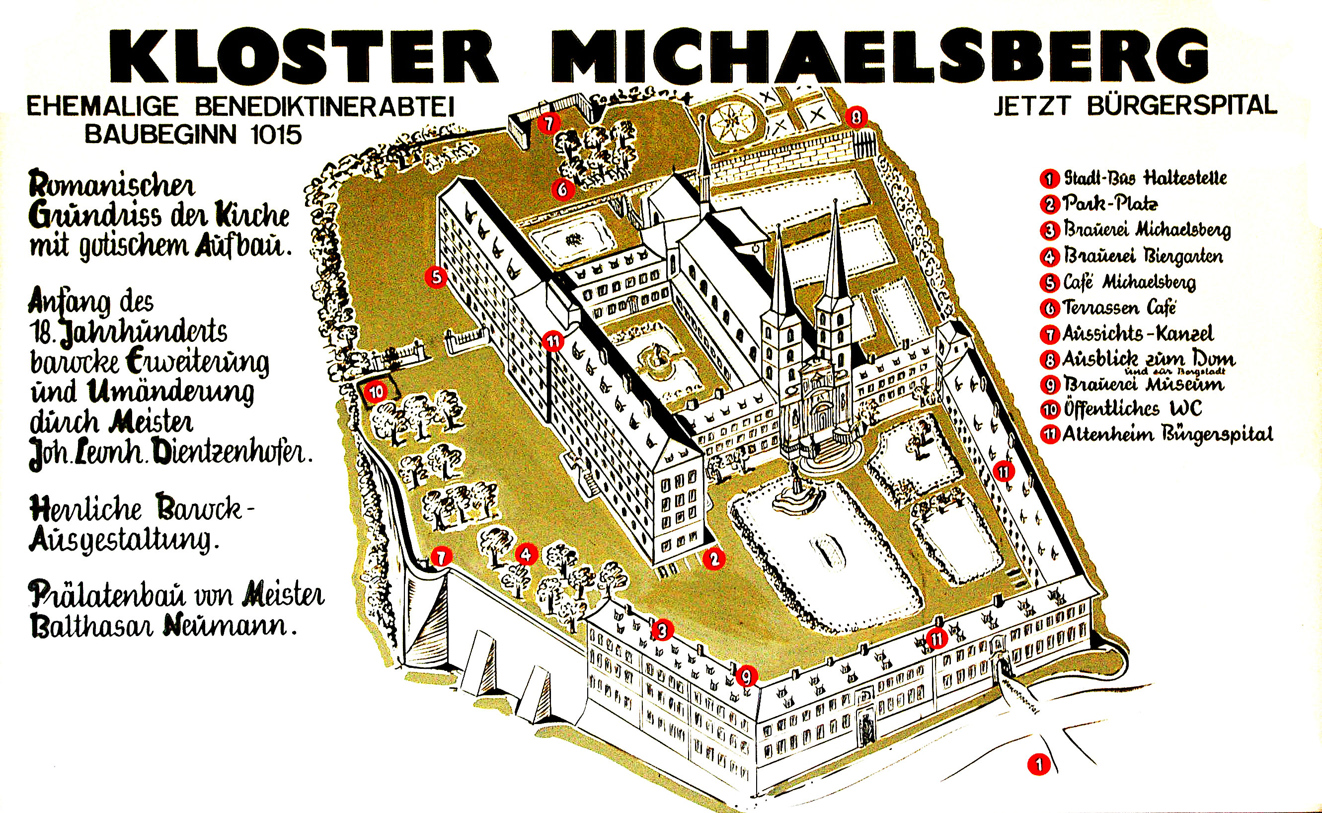 Bamberg - Kloster Michaelsberg - Plan